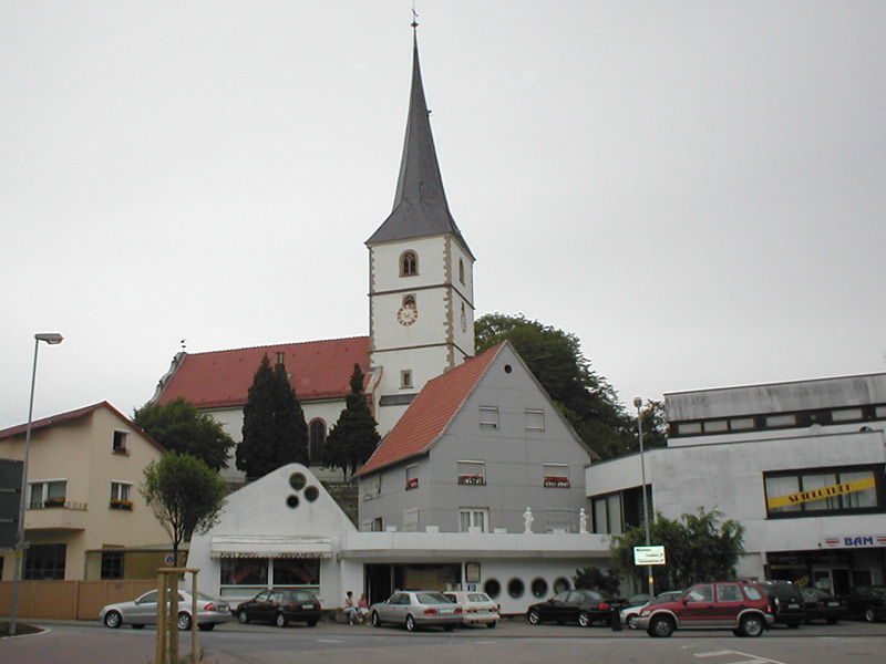 Evangelische Kirche von Obrigheim (Baden)